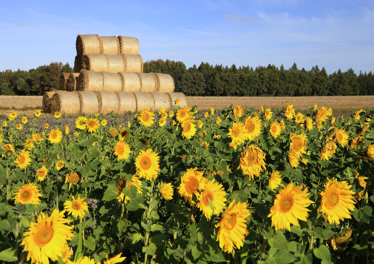 Spätsommer mit abgeernteten Feldern, Sonnenblumen und Strohballen in Mecklenburg